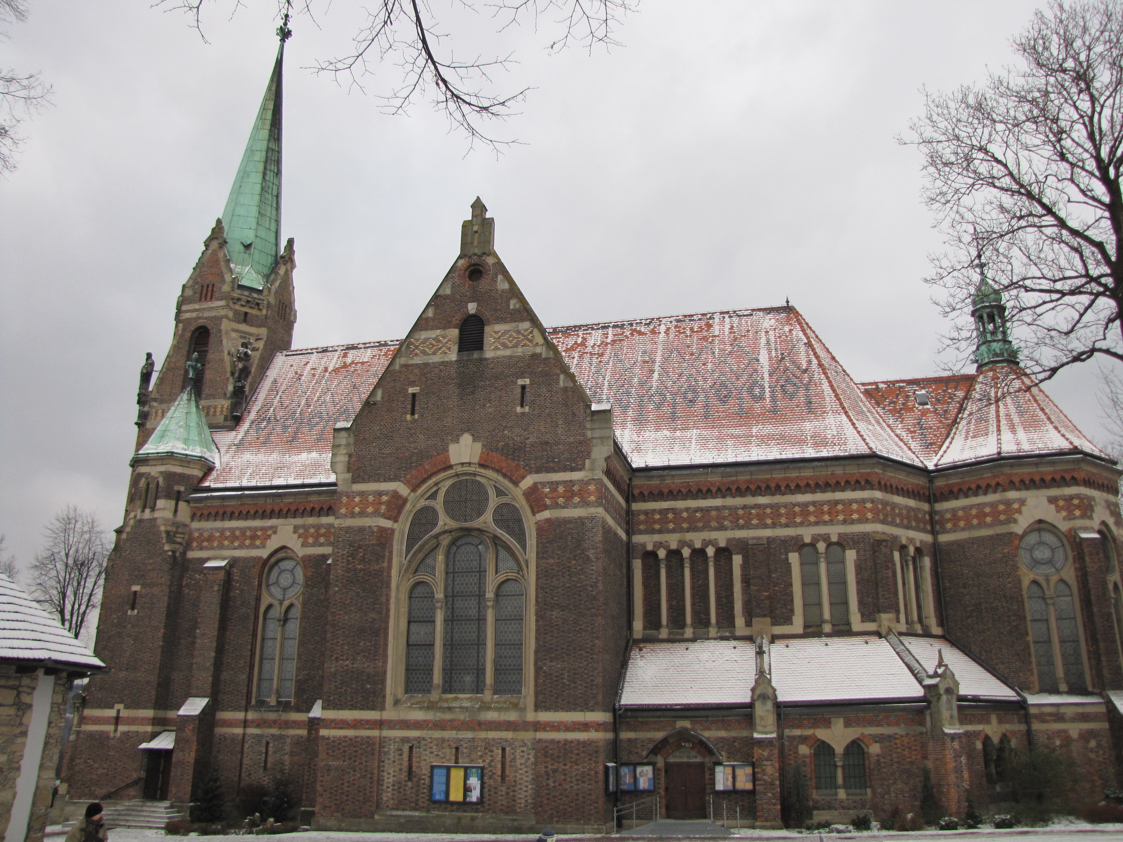 Kościół Nawiedzenia Najświętszej Marii Panny w Suchej Beskidzkiej